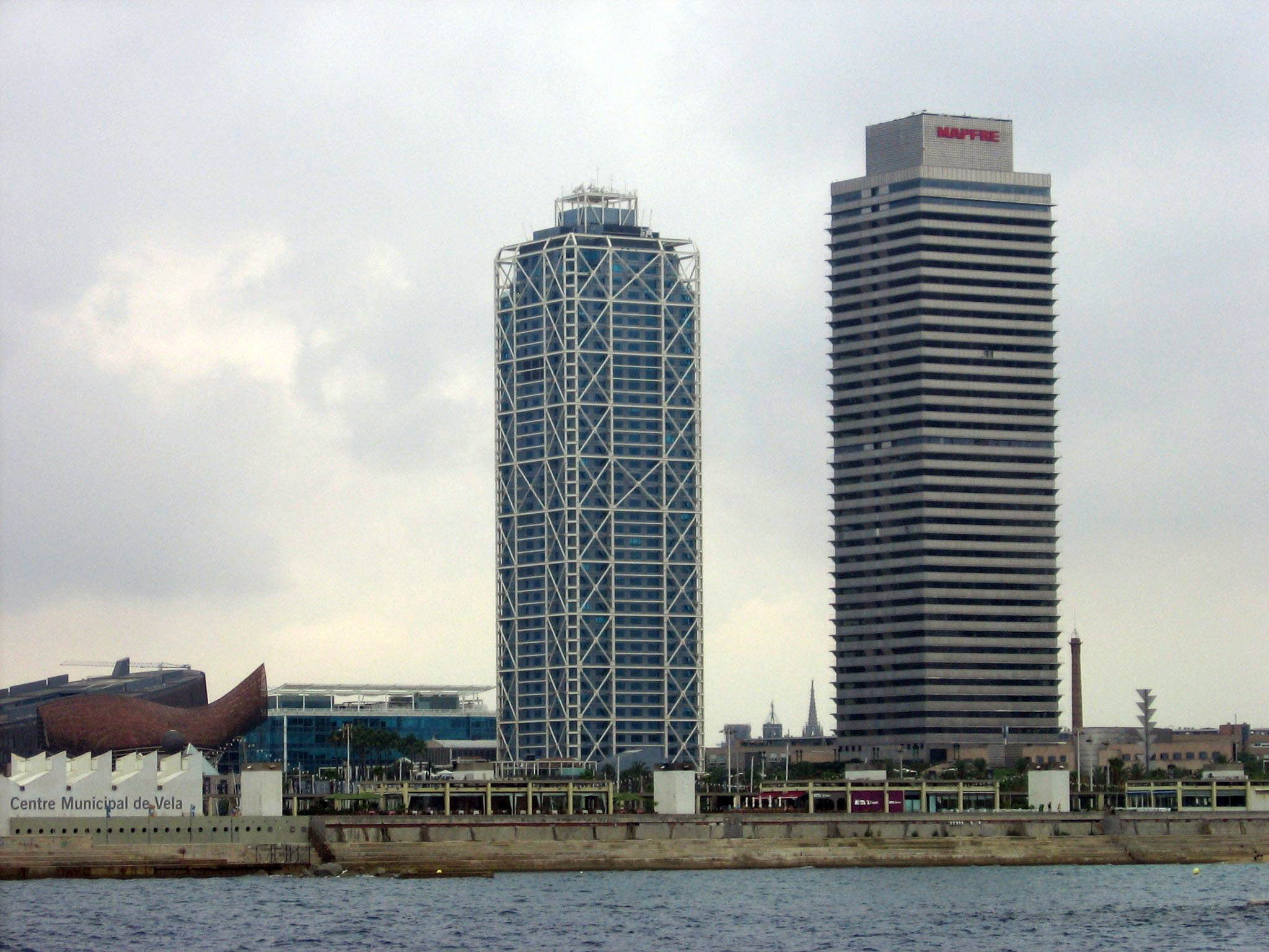 Torre Mapfre y Hotel Arts.